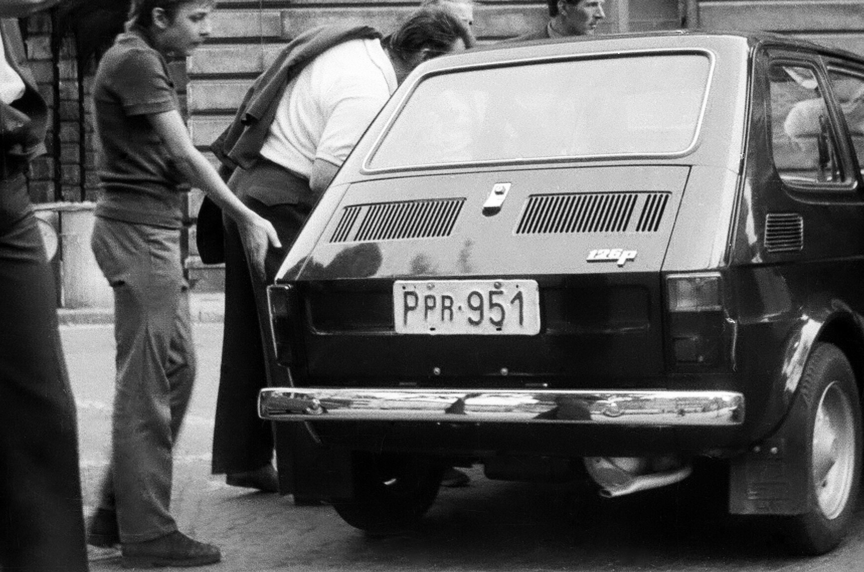 Polski Fiat 126p z tablicą rejestracyjną próbną z woj. poznańskiego ( 1973 r. )